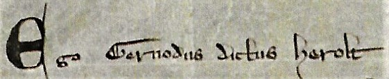 Ausschnitt aus einem Wertheimer Brief. Name Gernodus der Herold 1304